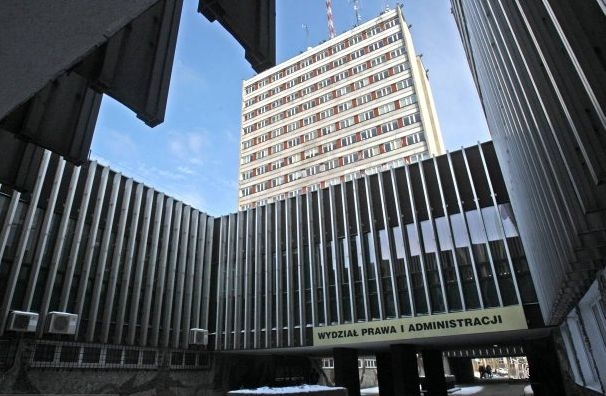 Budynek Wydziału Prawa i Administracji Uniwersytetu Marii Curie - Skłodowskiej w Lublinie